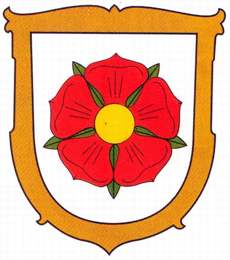 Zbiroh - znak města.